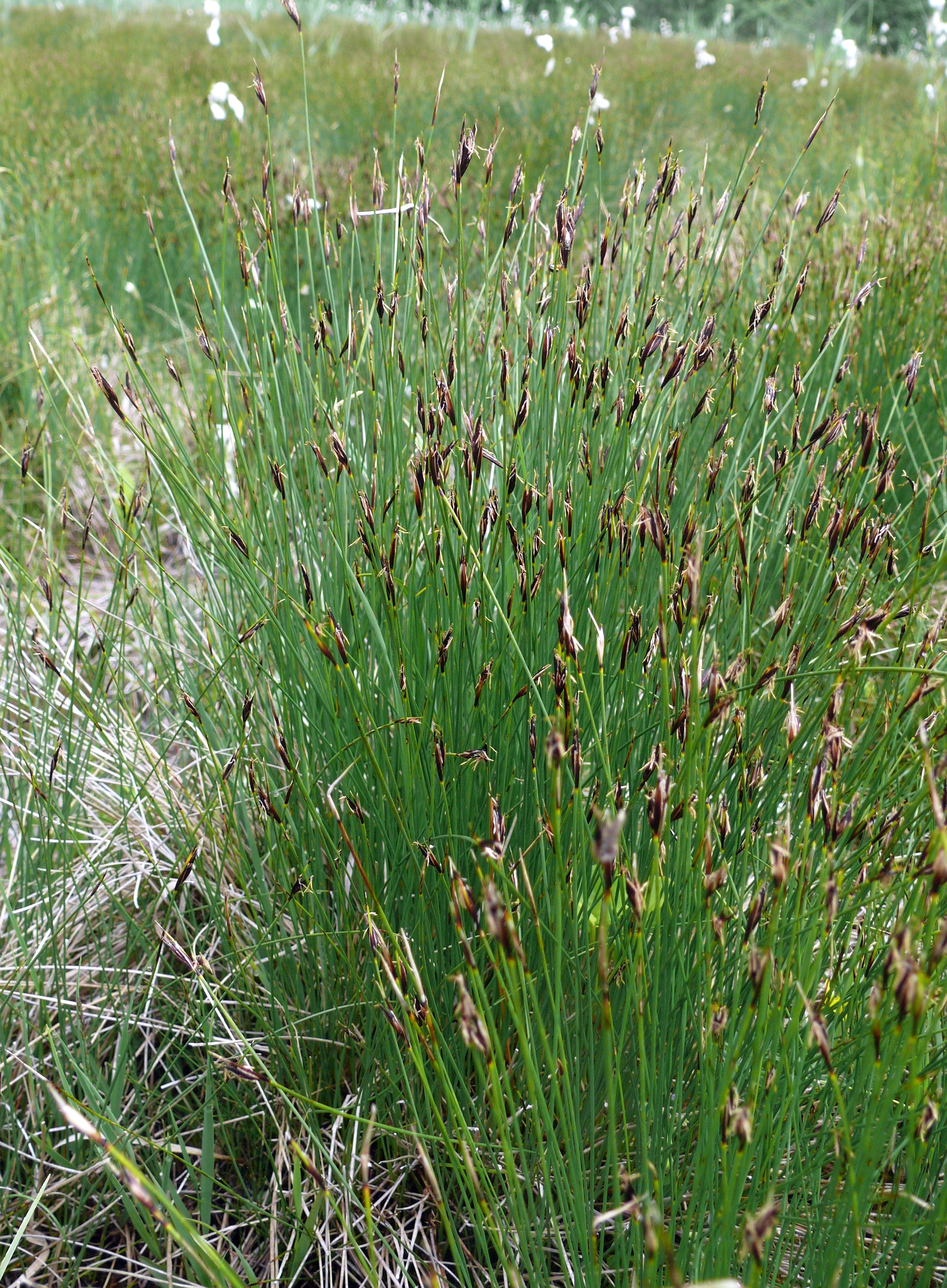 Schoenus ferrugineus, Oberschwaben, Deutschland